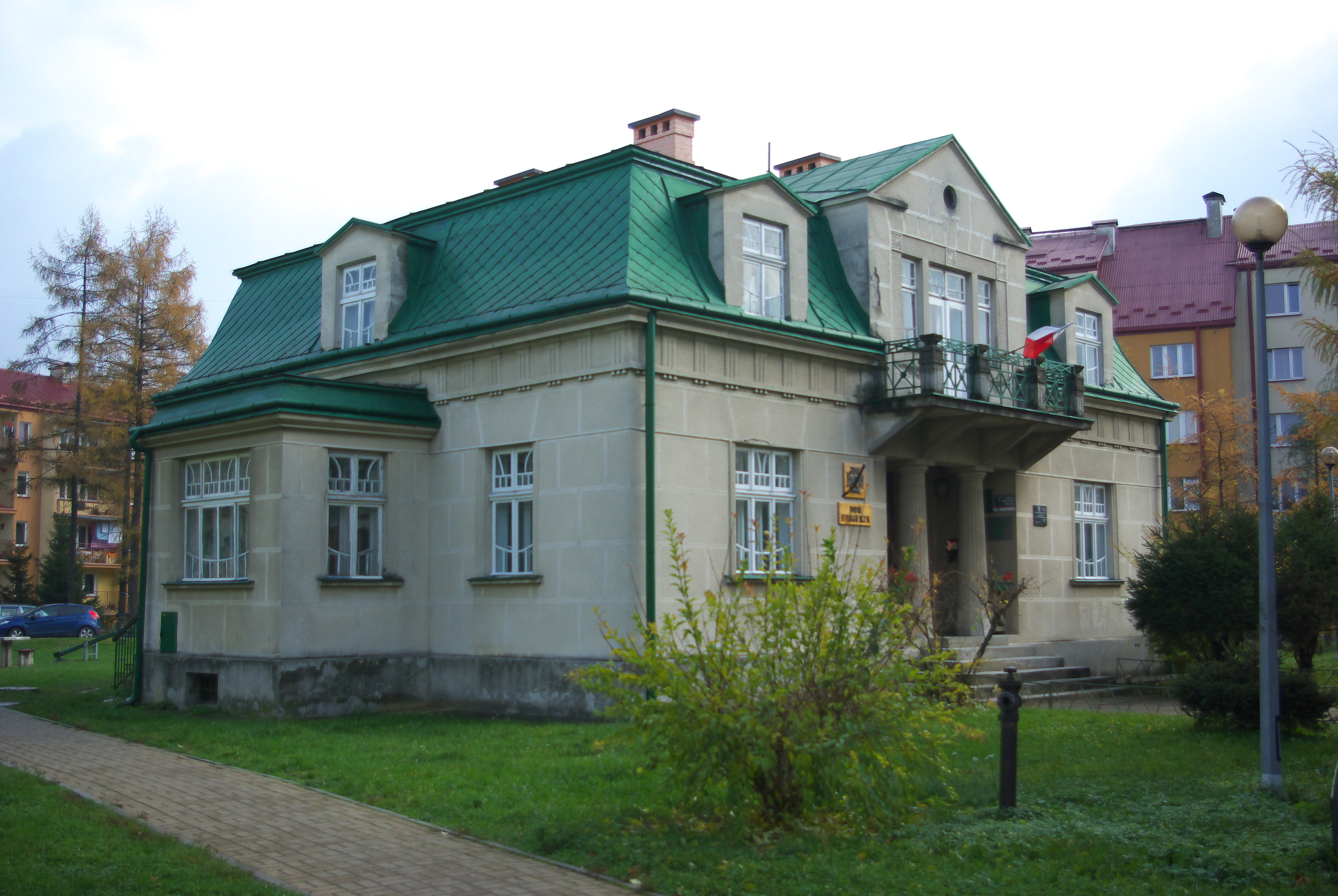 Willa Pod Topolami przy ul. Zielonej 39 w Sanoku. Dom Harcerza, siedziba komendy ZHP w Sanoku.